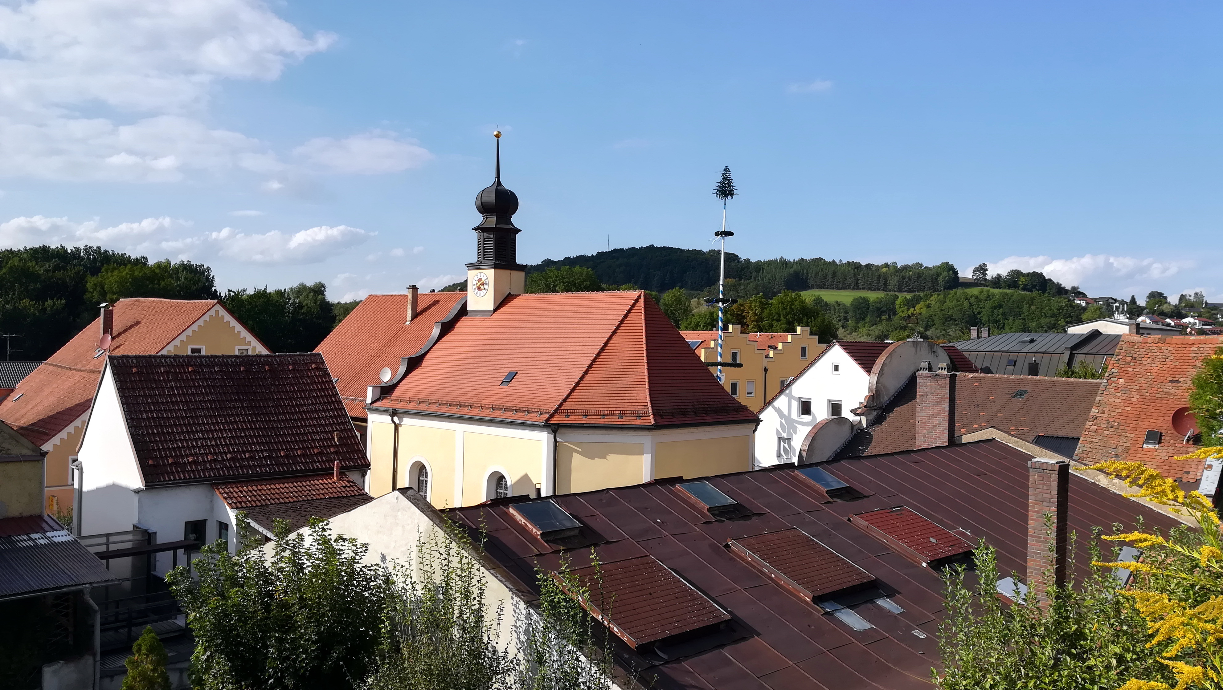 Bad Abbach ist ein Markt und Kurort im niederbayerischen Landkreis Kelheim und liegt im Donautal zwischen Kelheim und Regensburg.